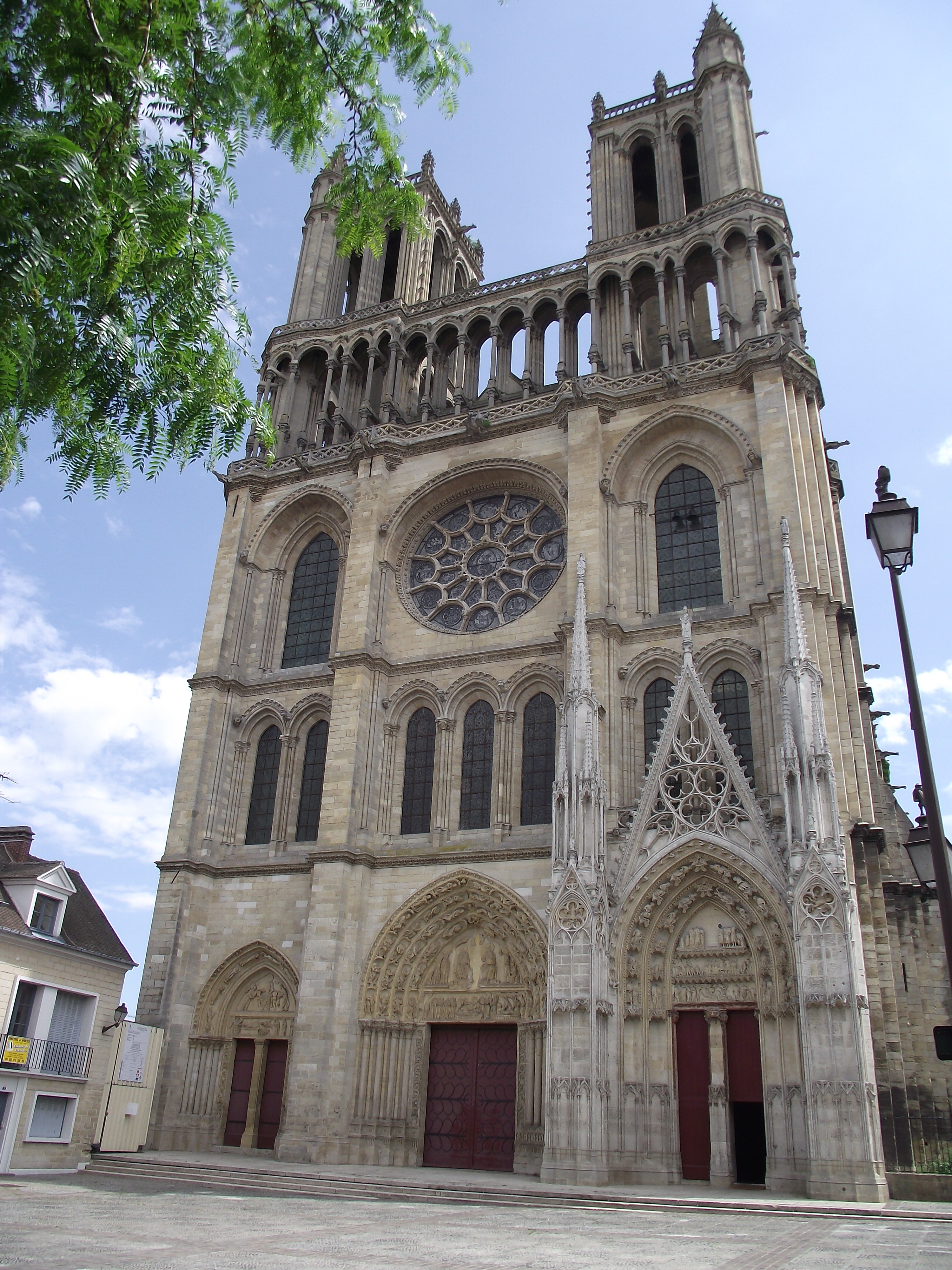 Mantes-la-Jolie, Collégiale Notre-Dame, 1150-1350